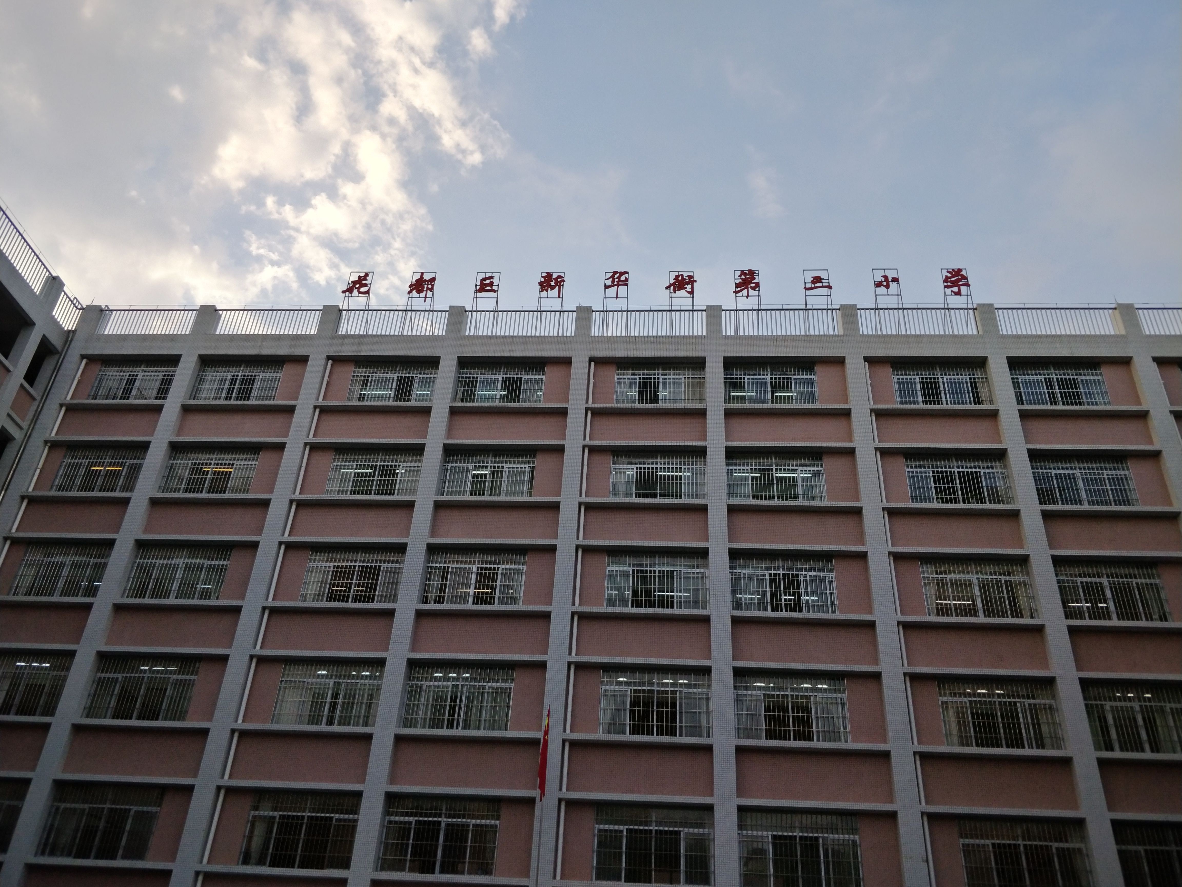 花都区新华街道第三小学教学楼